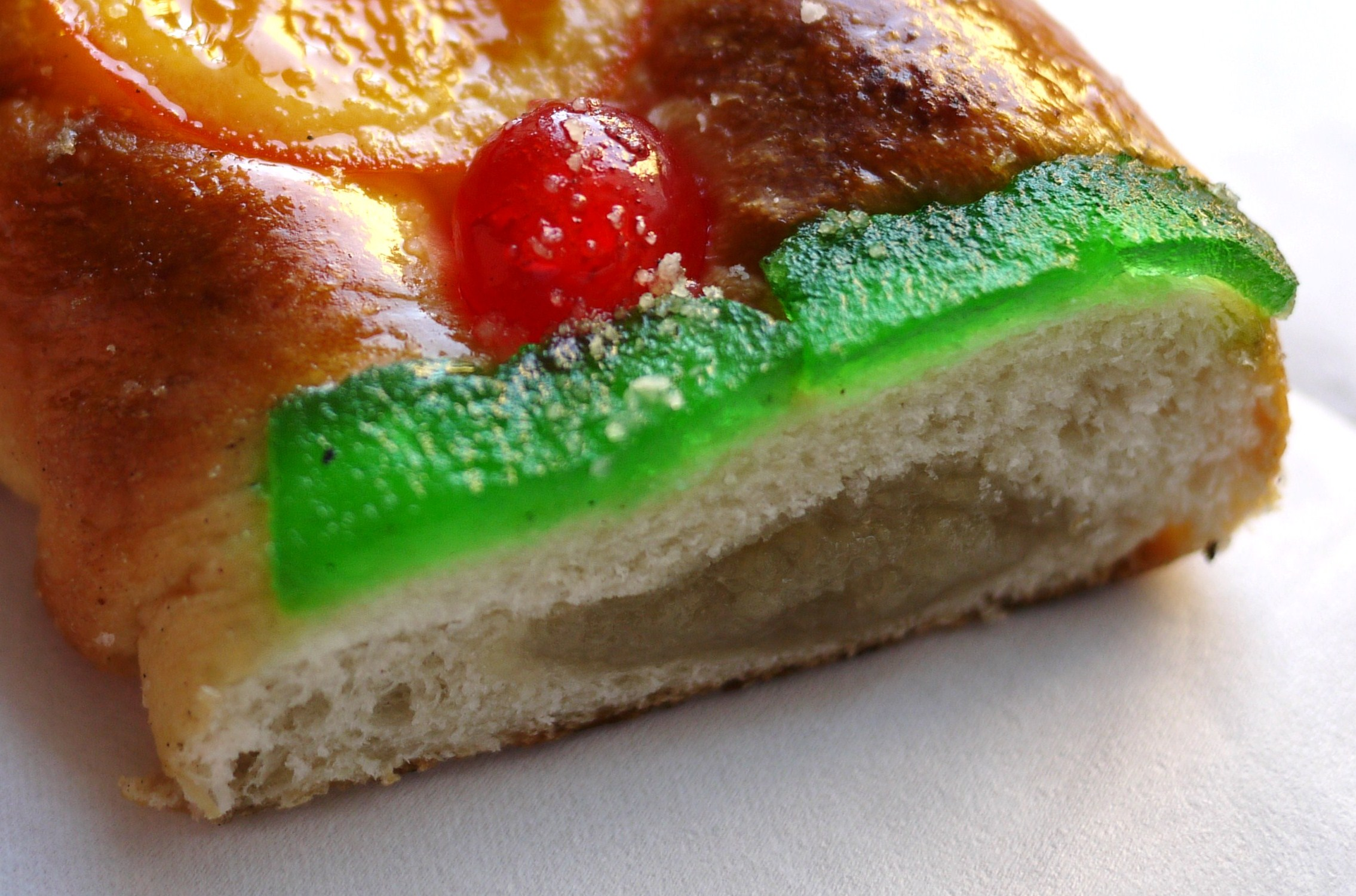 Cette coupe transversale d' un Tortell de Reis, Gâteau des Rois catalan, présente bien la pâte de fruits confis qui garnit l' intérieur de la pâtisserie. Le Tortell de Reis est le Gâteau des Rois catalan fabriqué pour le fête chrétienne de l' Epiphanie, le 6 janvier. Cette pâtisserie est une sorte de brioche de forme torique fourrée d' une pâte de fruits confits et parfumée à intérieur et au dessus recouvert de fruits confits en abondance et de sucre. En France, c' est la couronne des rois qui peut être partiellement rapprochée du Gâteau des Rois catalan. Ce morceau de Tortell de Reis vient de la pâtisserie Faure à Girona.